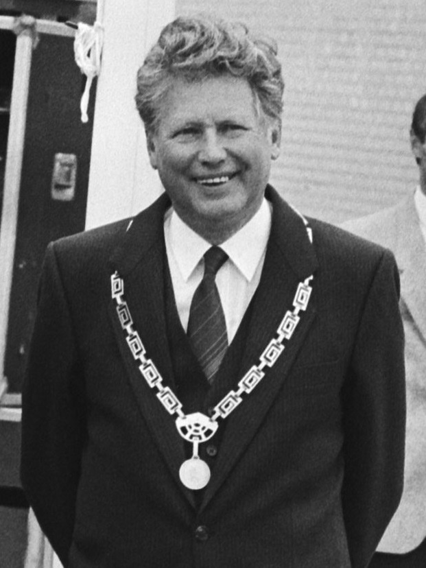 Pier van Gosliga tijdens koninginnedag 1985, Beatrix bezoekt o.a. Callantsoog